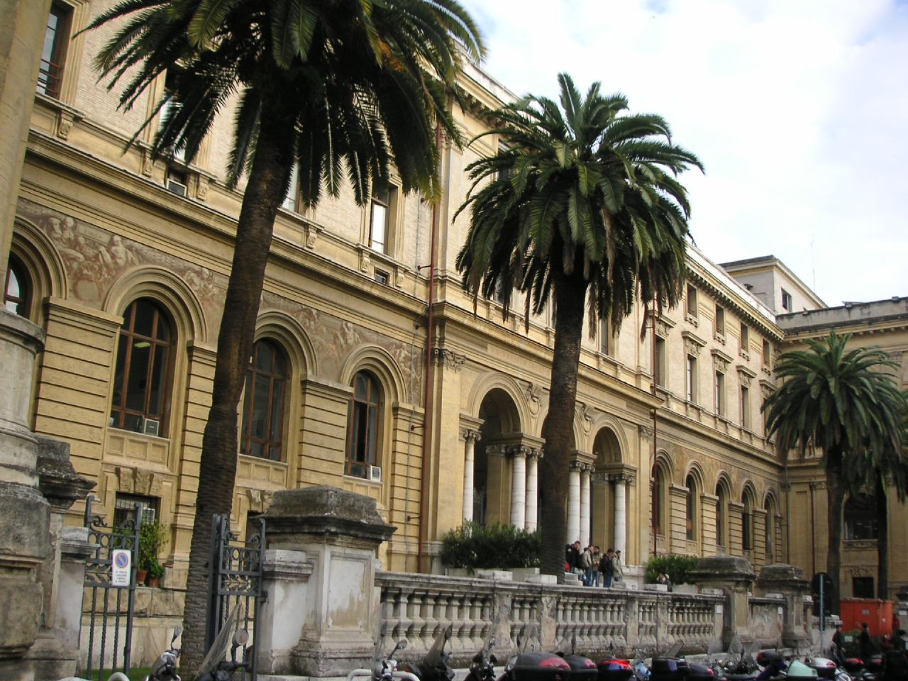 La Sapienza - Engineering faculty at Via Eudossiana, Roma (Italy)